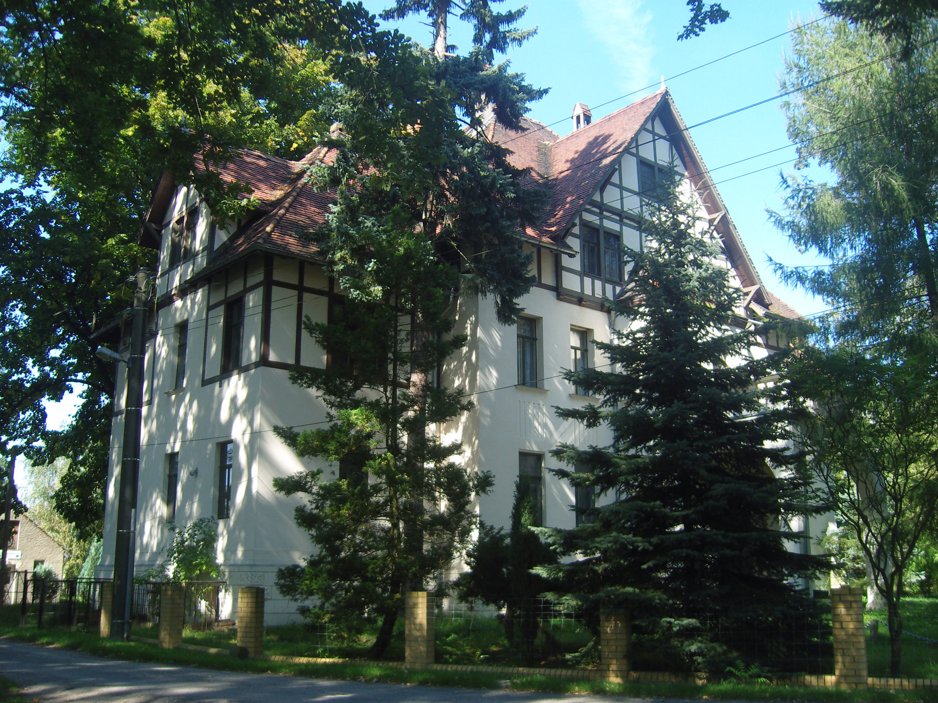 denkmalgeschütztes Gutshaus in Lipten